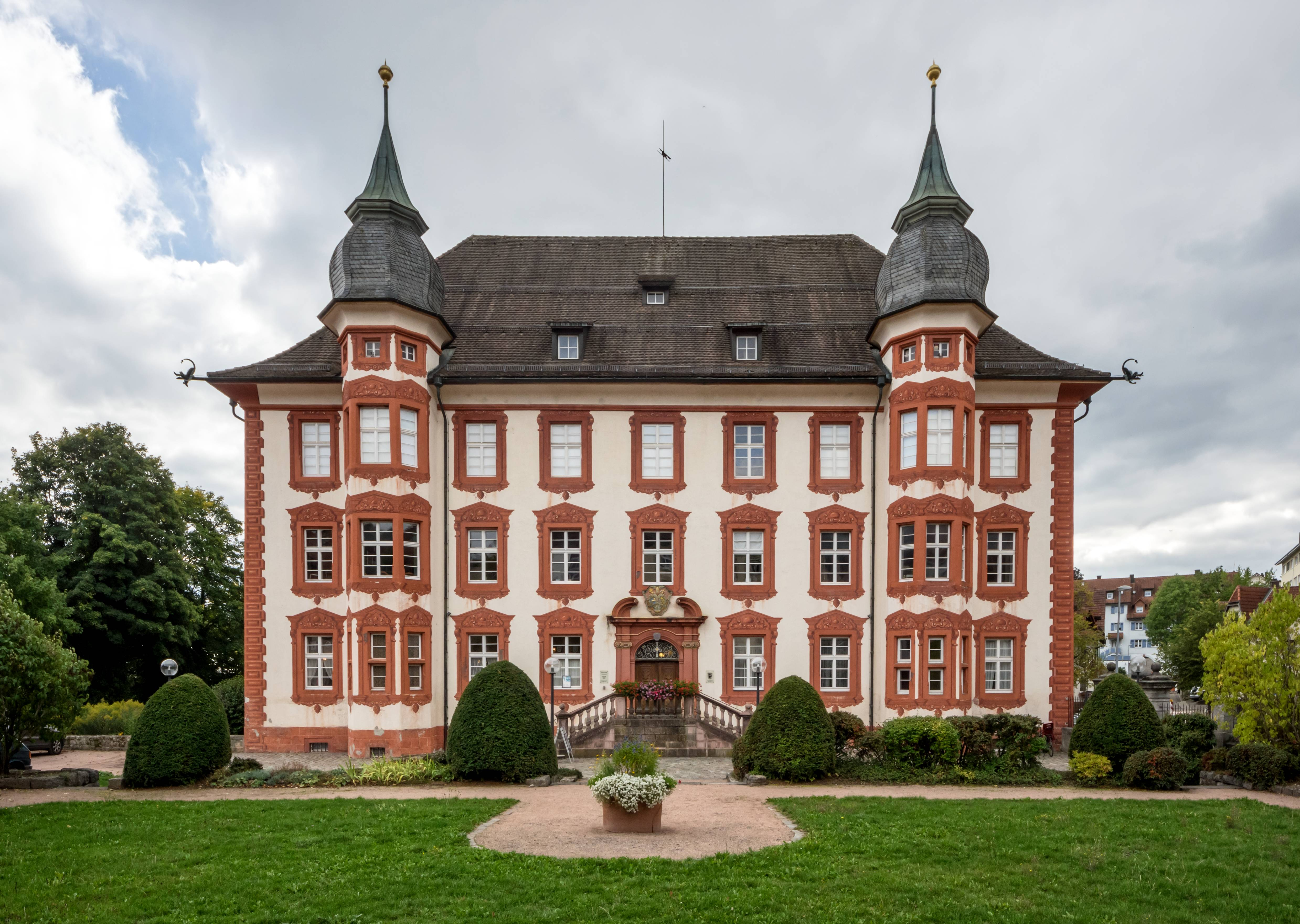 Bilder com Schloß in Bonndorf im Schwarzwald